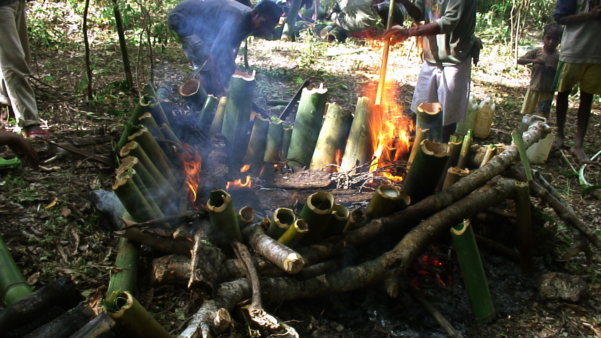 Tukir ist ein Lammgericht, das in Bambusrohren gekocht wird.